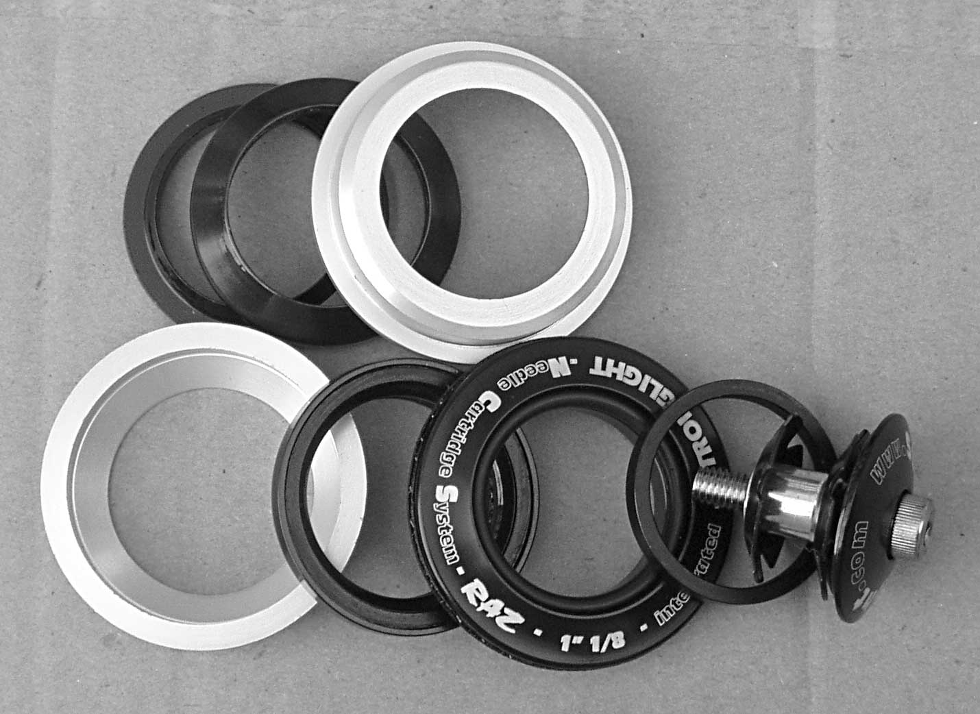 Steuersatz-ahead